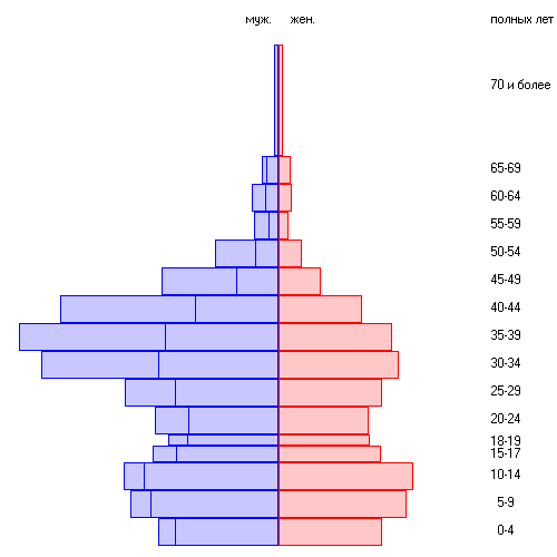 Всероссийская перепись населения 2002 года: азербайджанцы, пирамида возраст-пол.